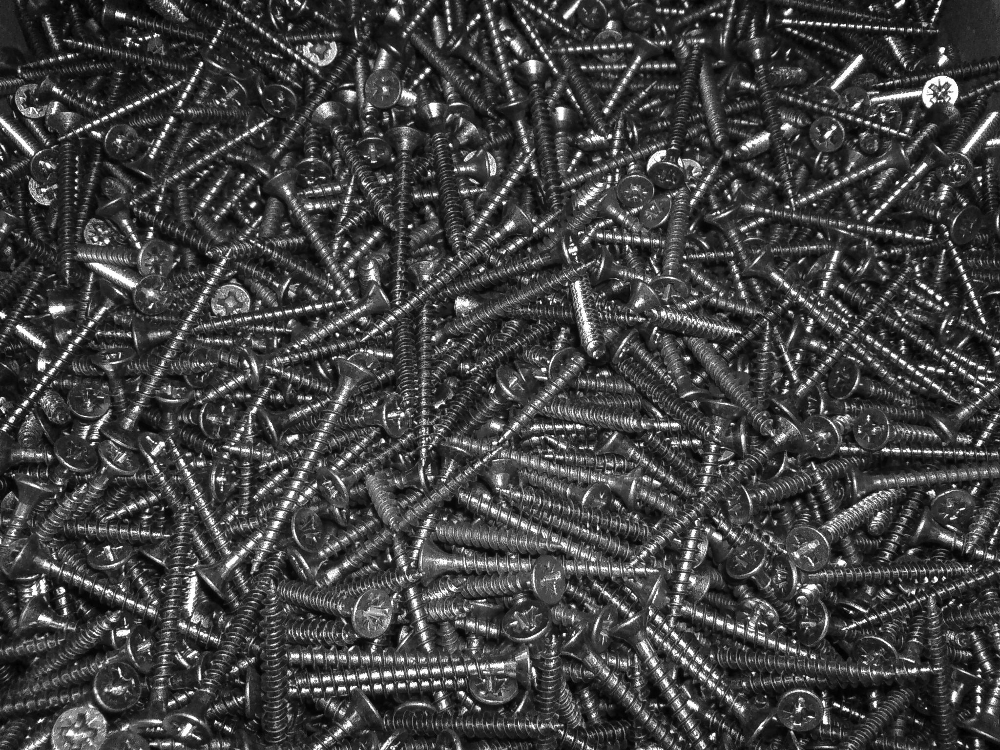 Il s'agit de vis vendues au poids